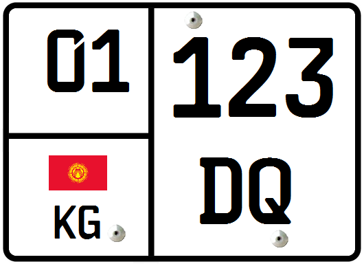 پلاک جدید جمهوری قرقیزستان